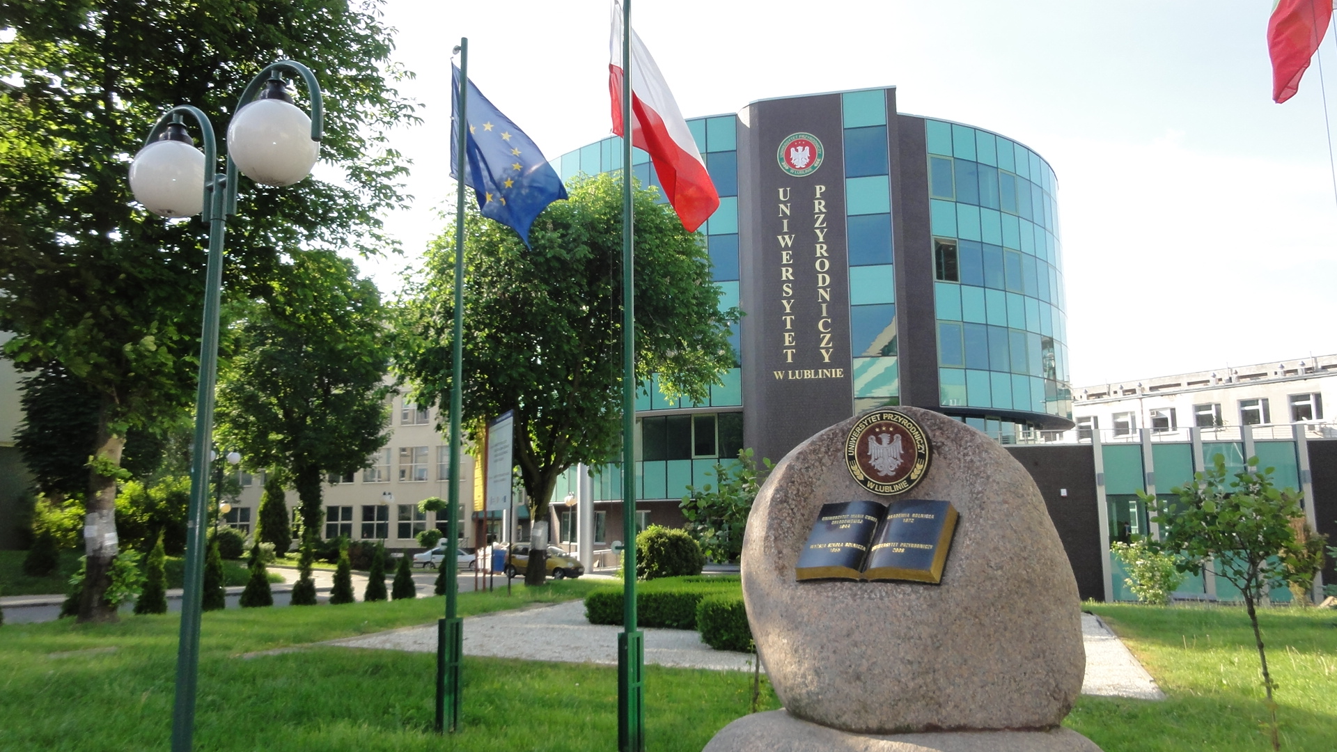 Kampus główny Uniwersytetu Przyrodniczego w Lublinie